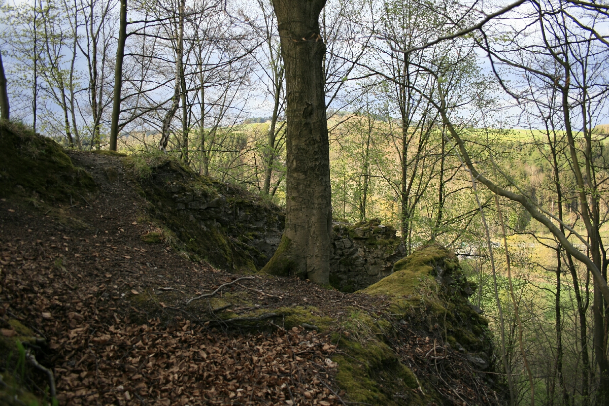 Turmfundament der Burgruine Borghausen (Attendorn)